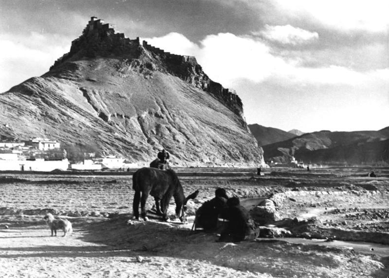 Gyantse, Dzong von rückwärts gesehen Information added by Wikimedia users.